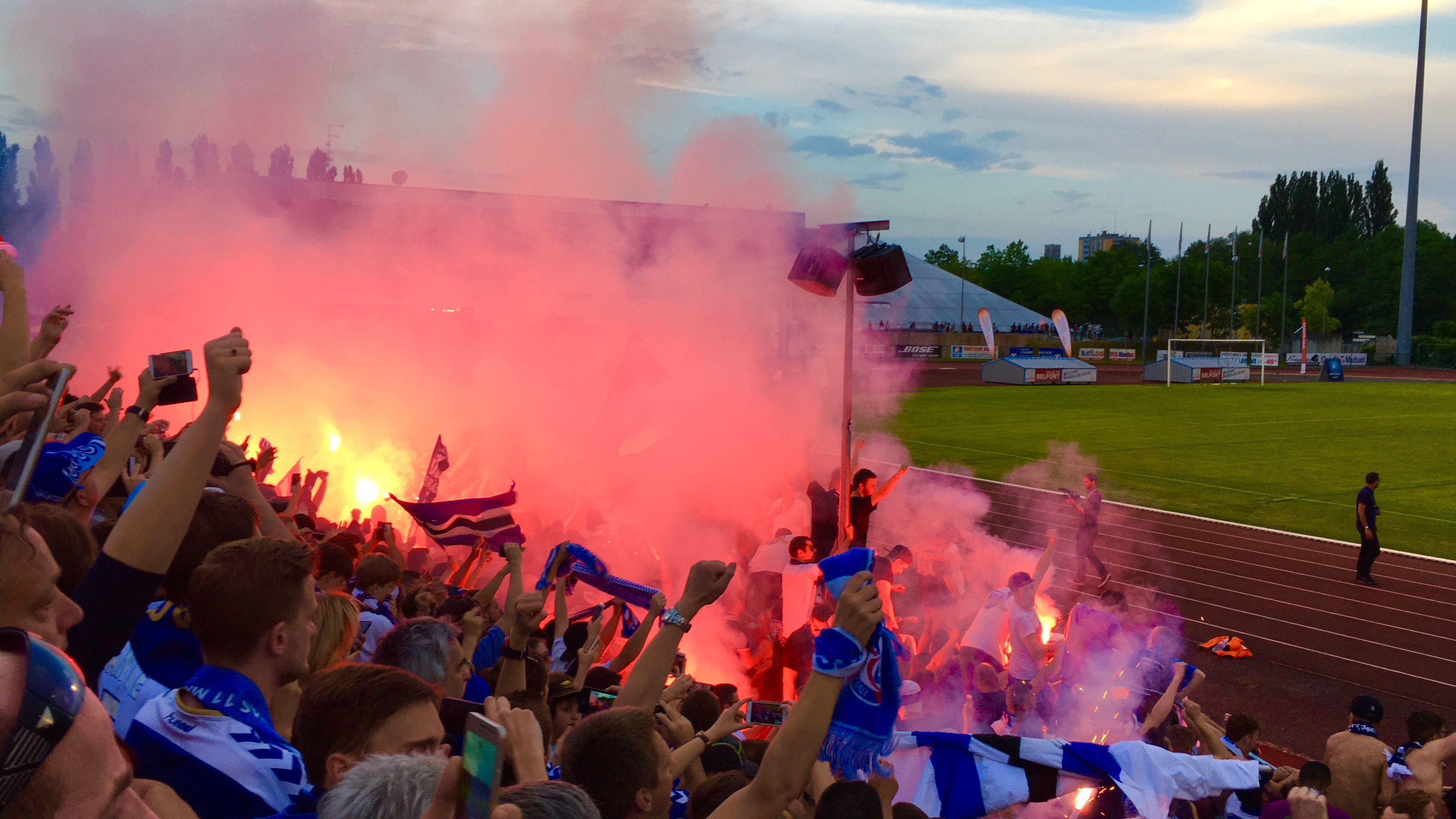 Match de la montée en Ligue 2 du RCSA au stade de Belfort